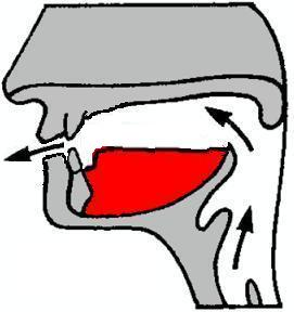 Labiaal fonetiek